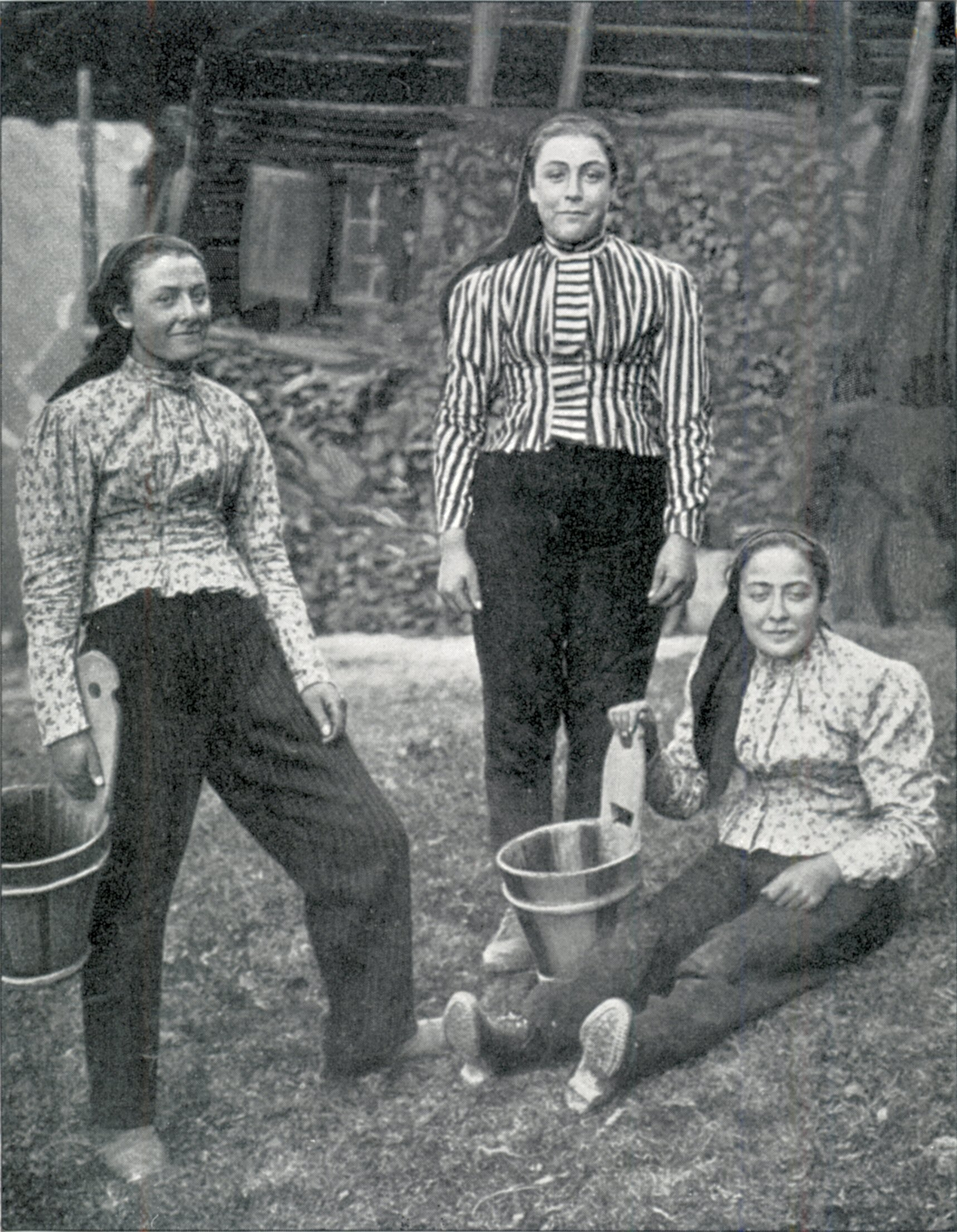 Bäuerinnen aus Champéry in Hosen.